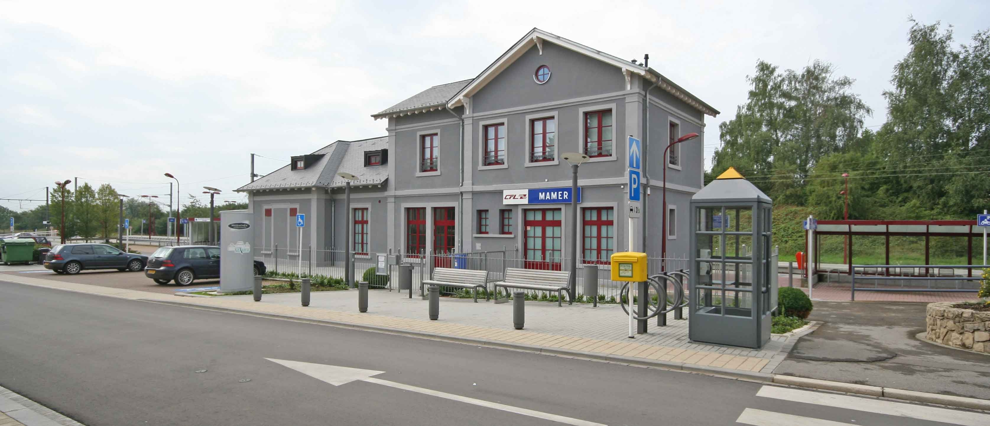 Sujet: GARE MAM 076 Source:Fotograf User:Cornischong